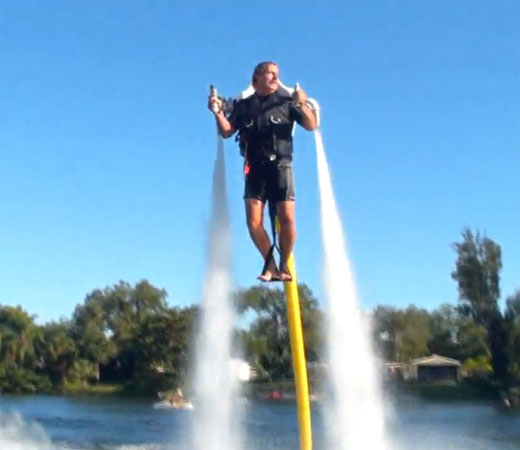 jetlev flyer le jetpack aquatique crée par ms watersports et distribué par pearl-watersports